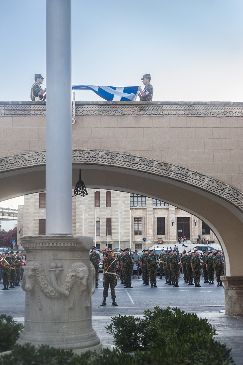 Υποστολή σημαίας.